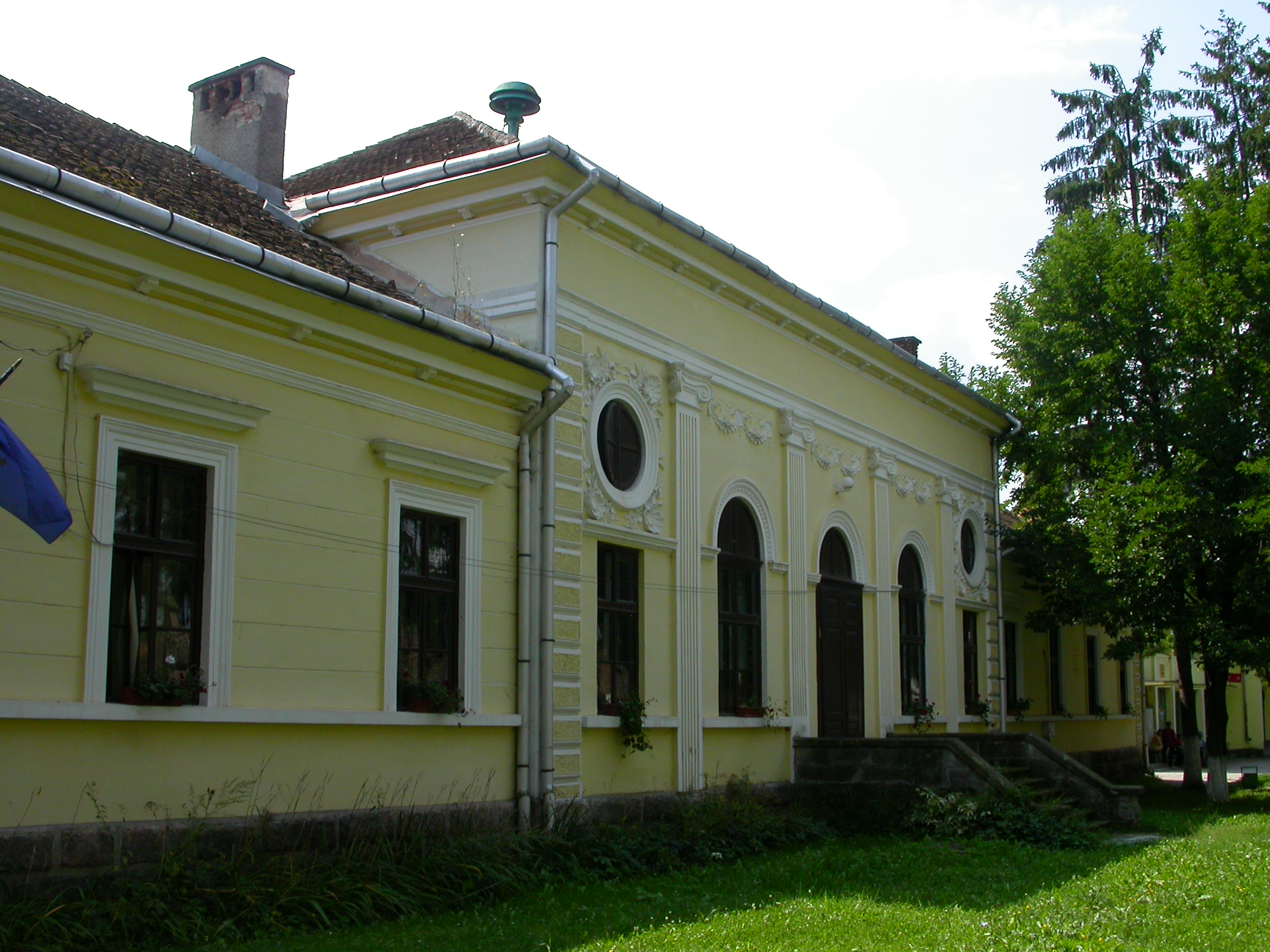 Casă cu arcade, sec. XIX